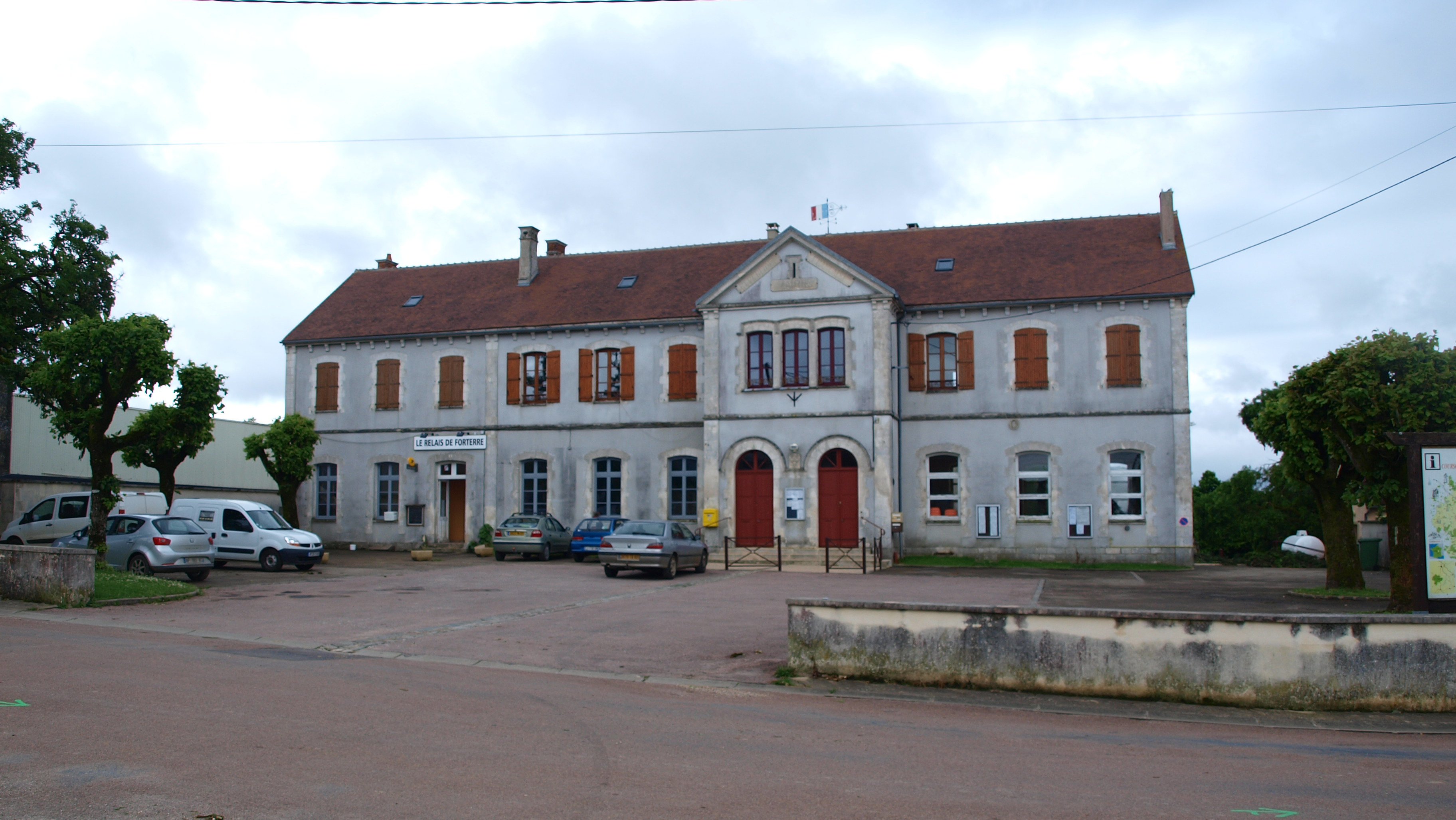 Taingy (Yonne, France) ; mairie